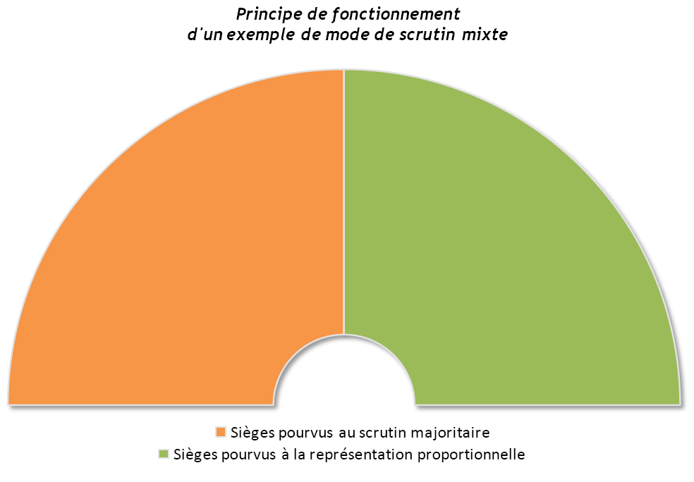 tout est dans le titre !